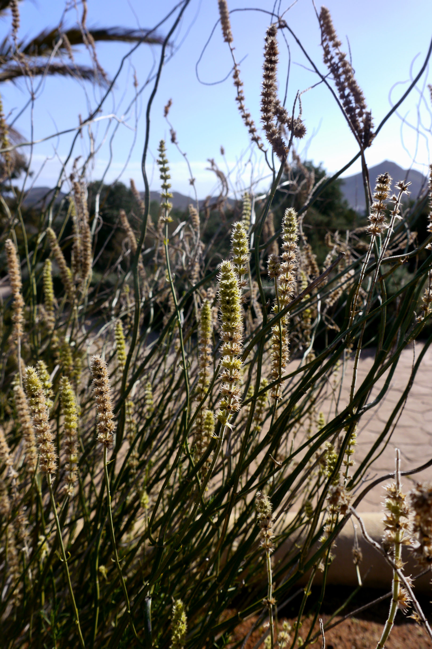 Sideritis lasiantha en el Jardín Botánico de Rodalquilar, Almería, España.